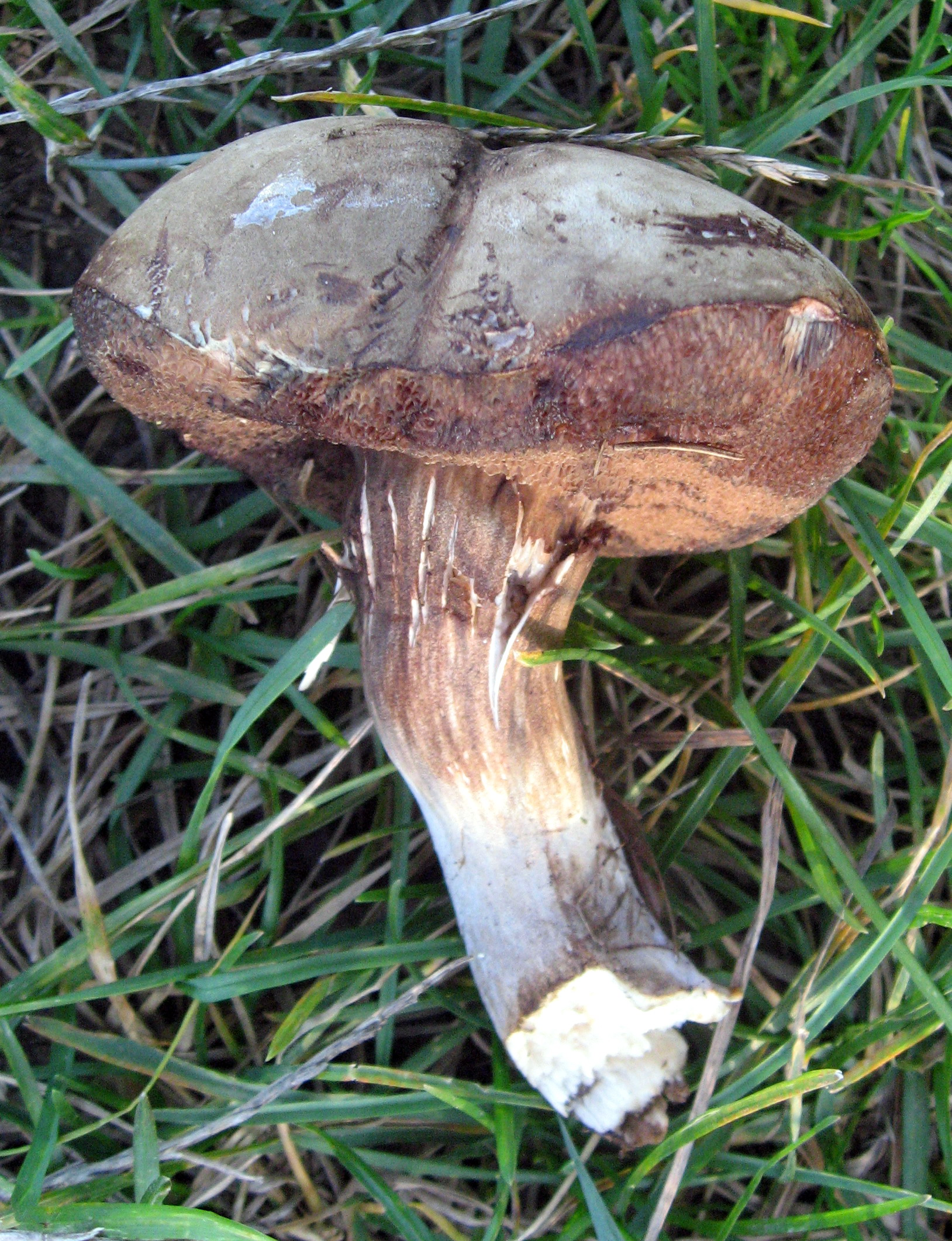 Hřib nachovýtrusnýLatina: Boletus pseudoscaber / Porphyrellus pseudoscaber / Porphyrellus porphyrosporus /